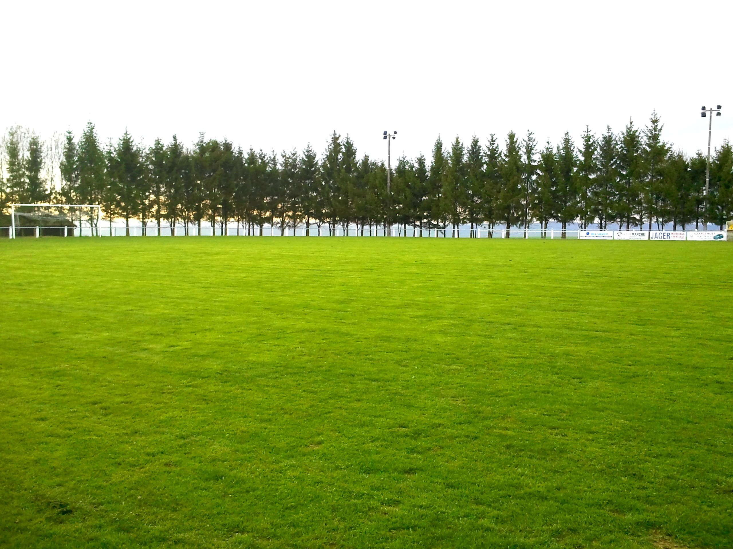 Terrain de Foot du Village de Coume